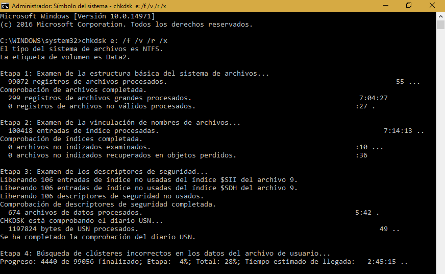 Ejecución de Chkdsk sobre Windows 10 Insider Preview 14971 parametrizado para corrección de errores y búsqueda de sectores defectuosos